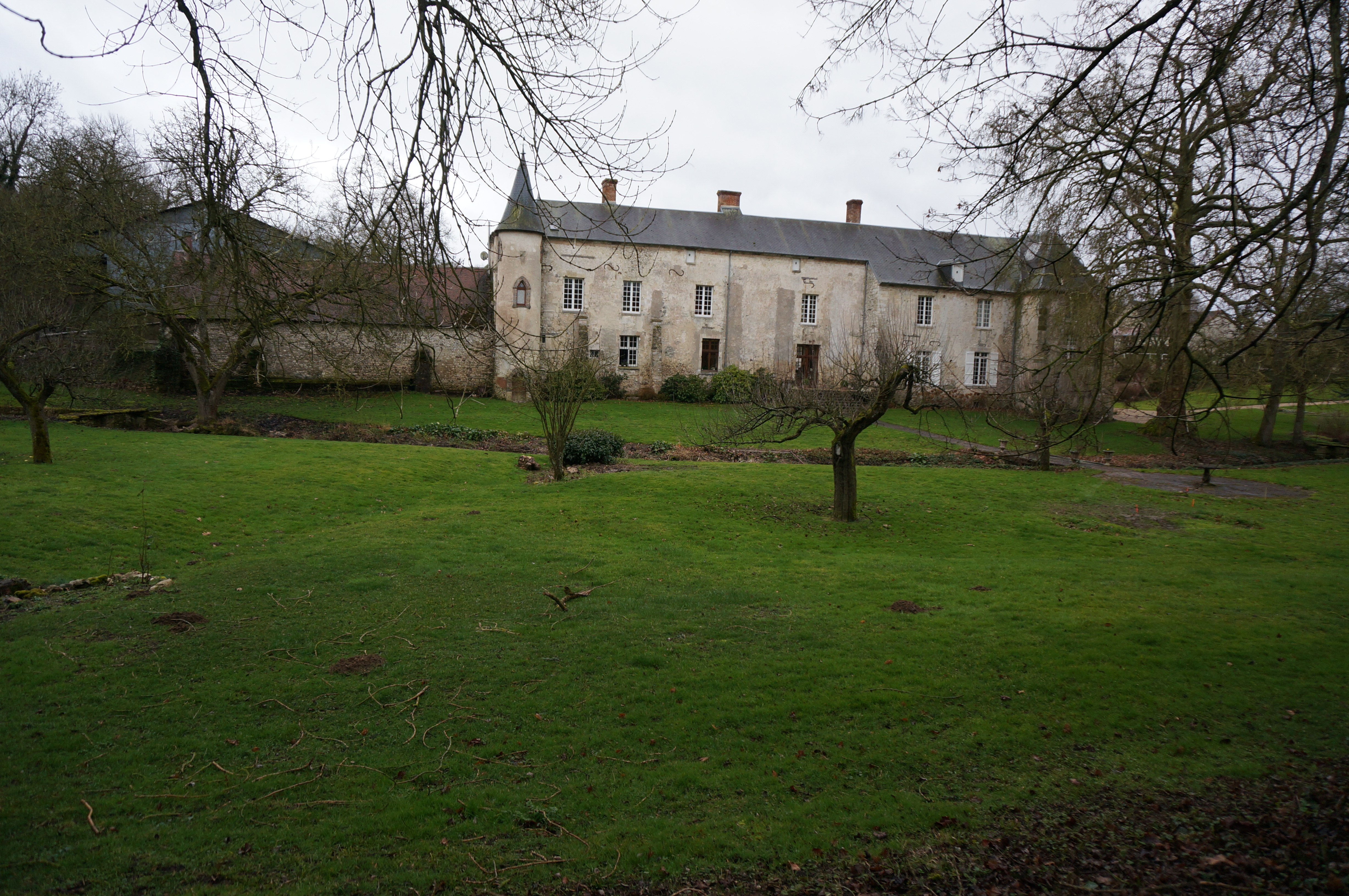 le chateau de Villers-Agron-Aiguizy.